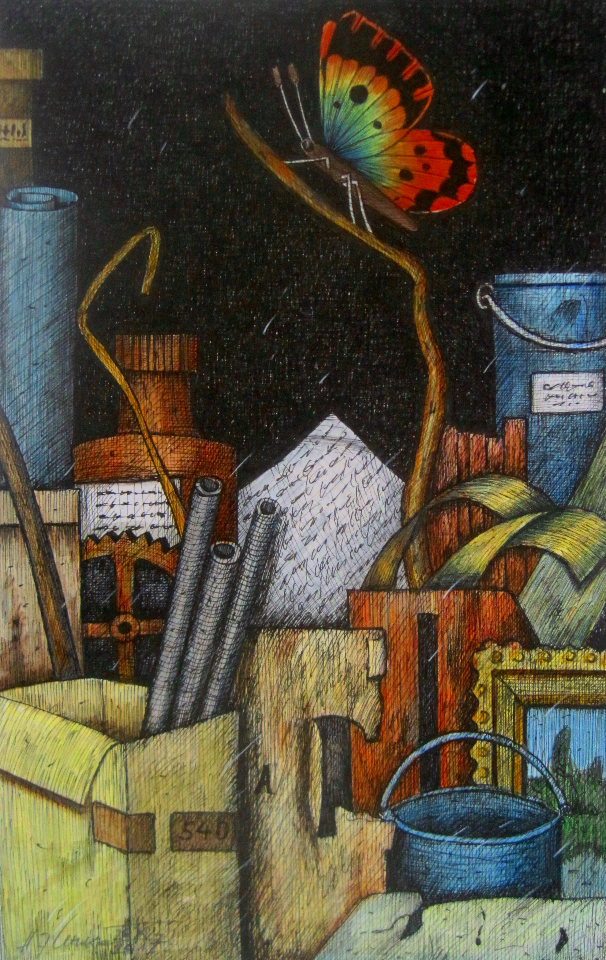 Die Welt 2050 n. Chr. , 2018, Aquarell, Tusche, Farbstift